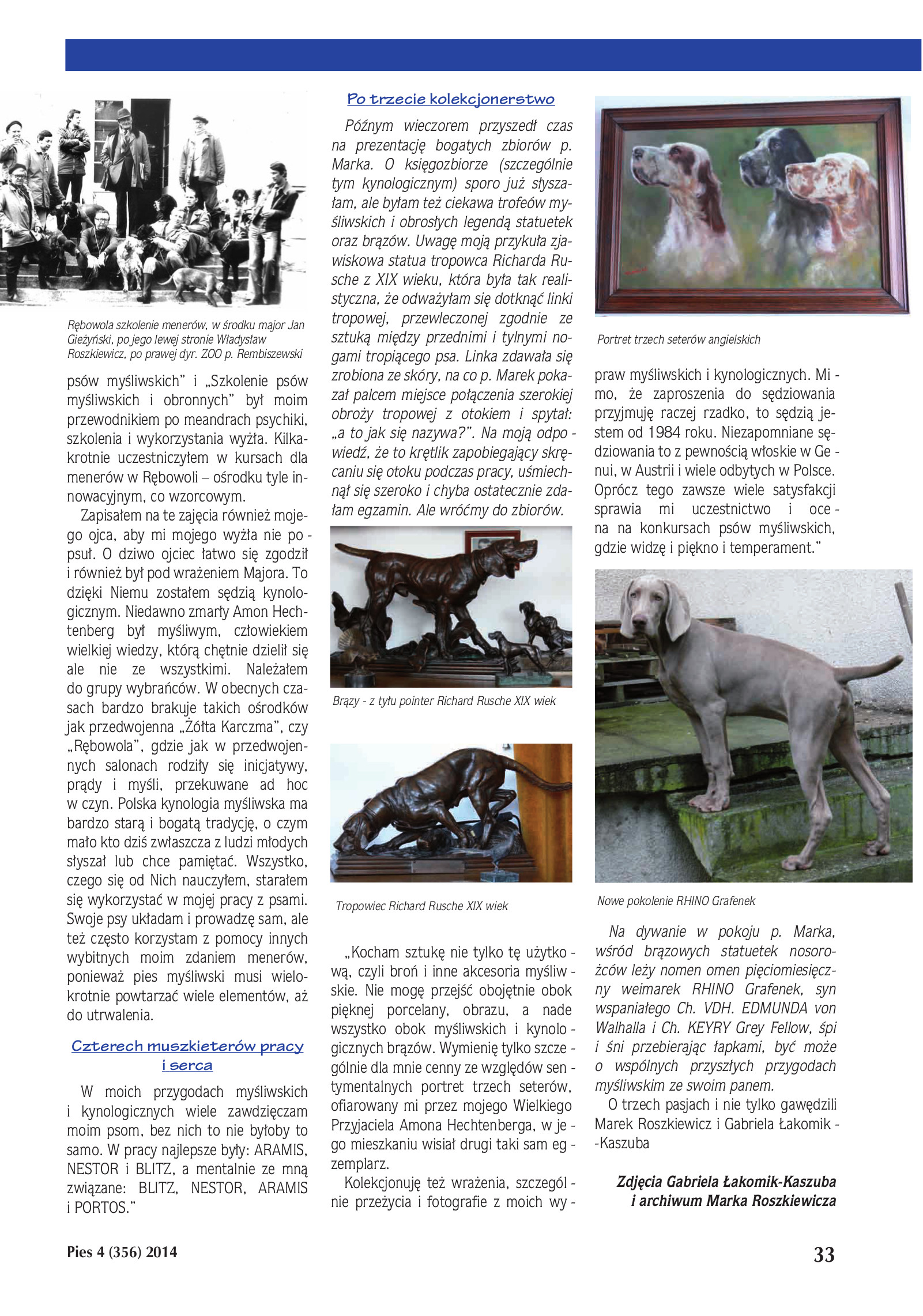 "Tradycja i zamiłowanie", PIES, 4 (356) 2014, strona 4/4.